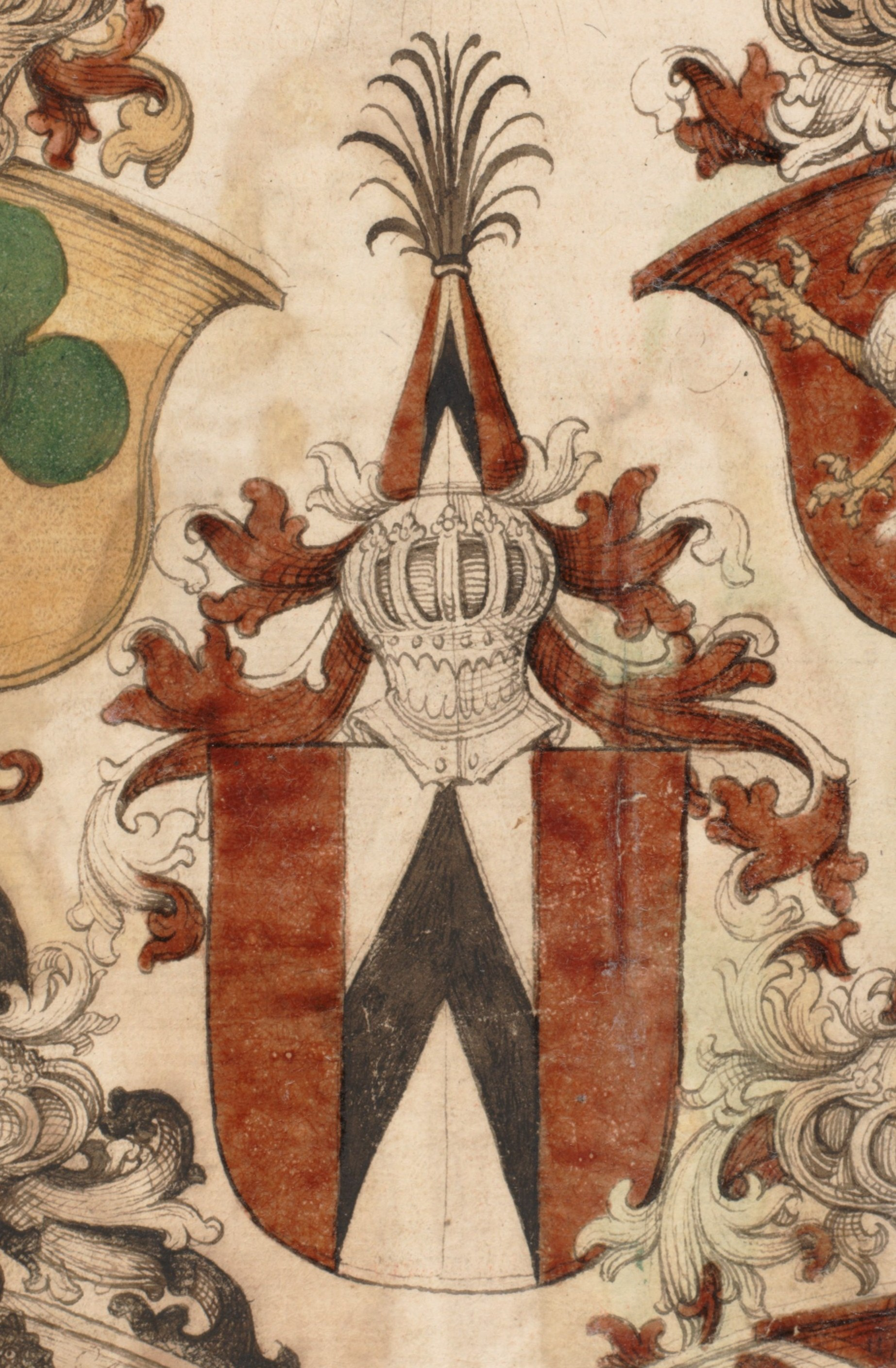 Wappen des Rudolf von Erlach (* 1448 in Bern; † 18. November 1507 ebenda) Schultheiss der Stadt Bern, und seiner Familie - Diebold Schilling: Spiezer Chronik, Bern, [Burgerbibliothek, Mss.h.h.I.16, p. 29] - Detail der Wappentafel (Ahnenprobe) zu Rudolf von Erlach. „In Alto Est Lux“, war der zugehörige Wappenspruch, abgekürzt „I·A·E·L“. Die in Bern seit dem frühen 13. Jahrhundert ansässigen von Erlach waren ursprünglich Ministeriale der Herren von Neuenburg. Ihr Name geht auf die Ortschaft Erlach am Bielersee zurück. Die Nachkommen des Hieronymus von Erlach führen den Titel Reichsgraf von Erlach. Wappen des Rudolf von Erlach (* 1448 in Bern; † 18. November 1507 ebenda) Schultheiss der Stadt Bern, und seiner Familie - Diebold Schilling: Spiezer Chronik, Bern, [Burgerbibliothek, Mss.h.h.I.16, p. 29] - Detail der Wappentafel (Ahnenprobe) zu Rudolf von Erlach. „In Alto Est Lux“, war der zugehörige Wappenspruch, abgekürzt „I·A·E·L“.